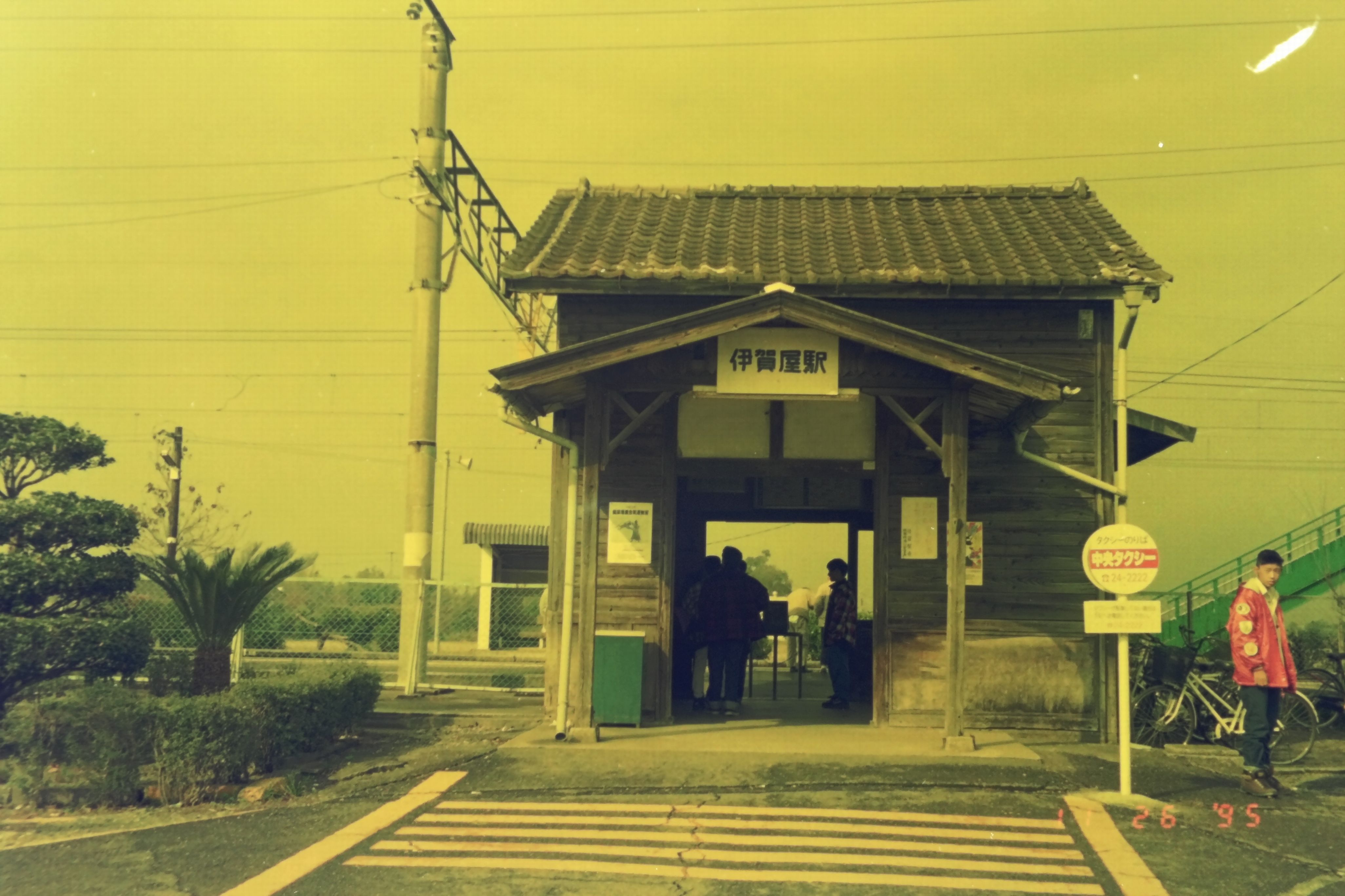 伊賀屋駅駅舎（1993年）